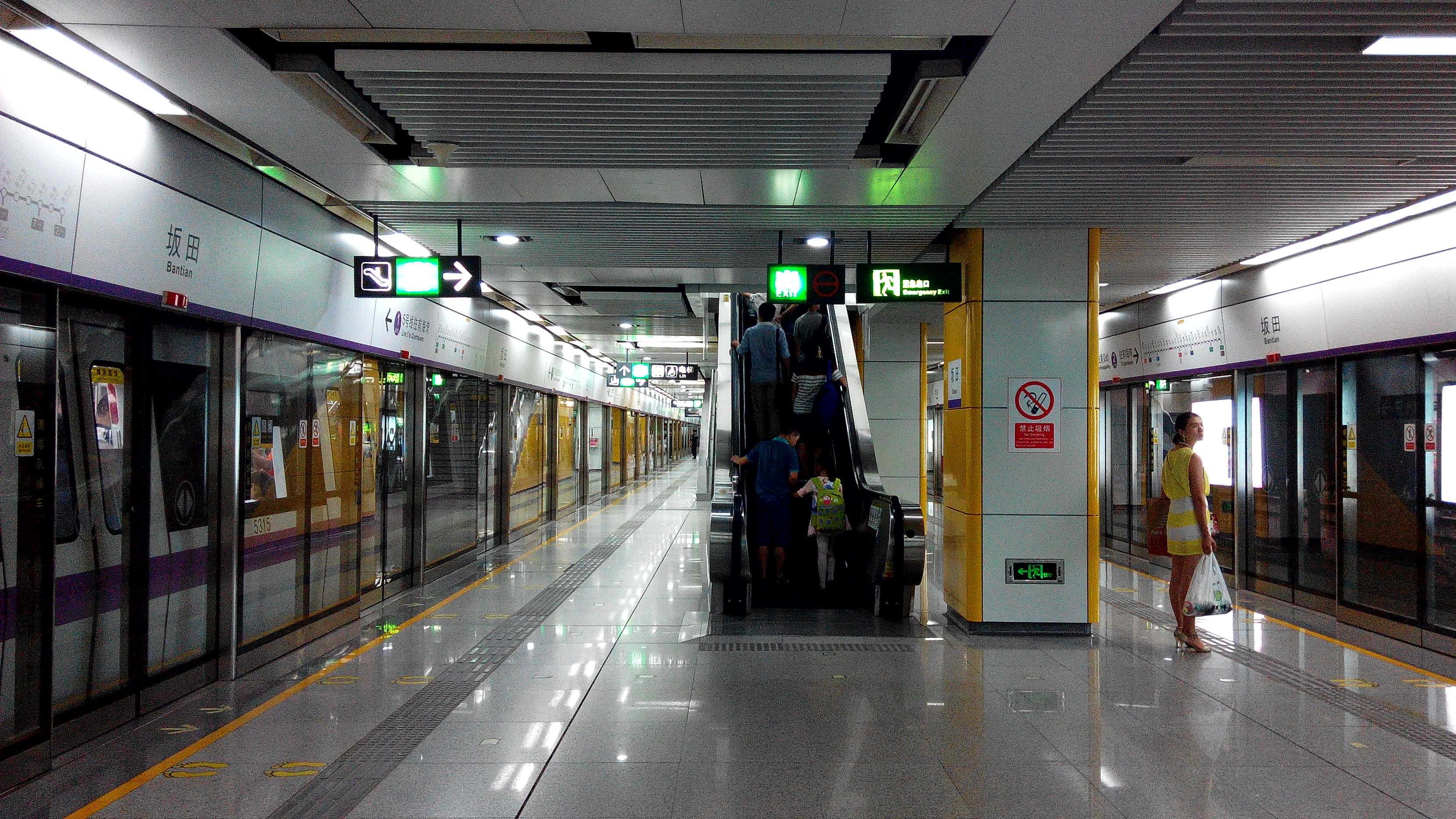 深圳地铁5号线坂田站站台